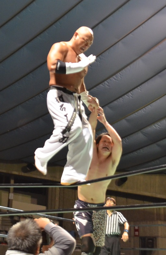 拝み渡り，